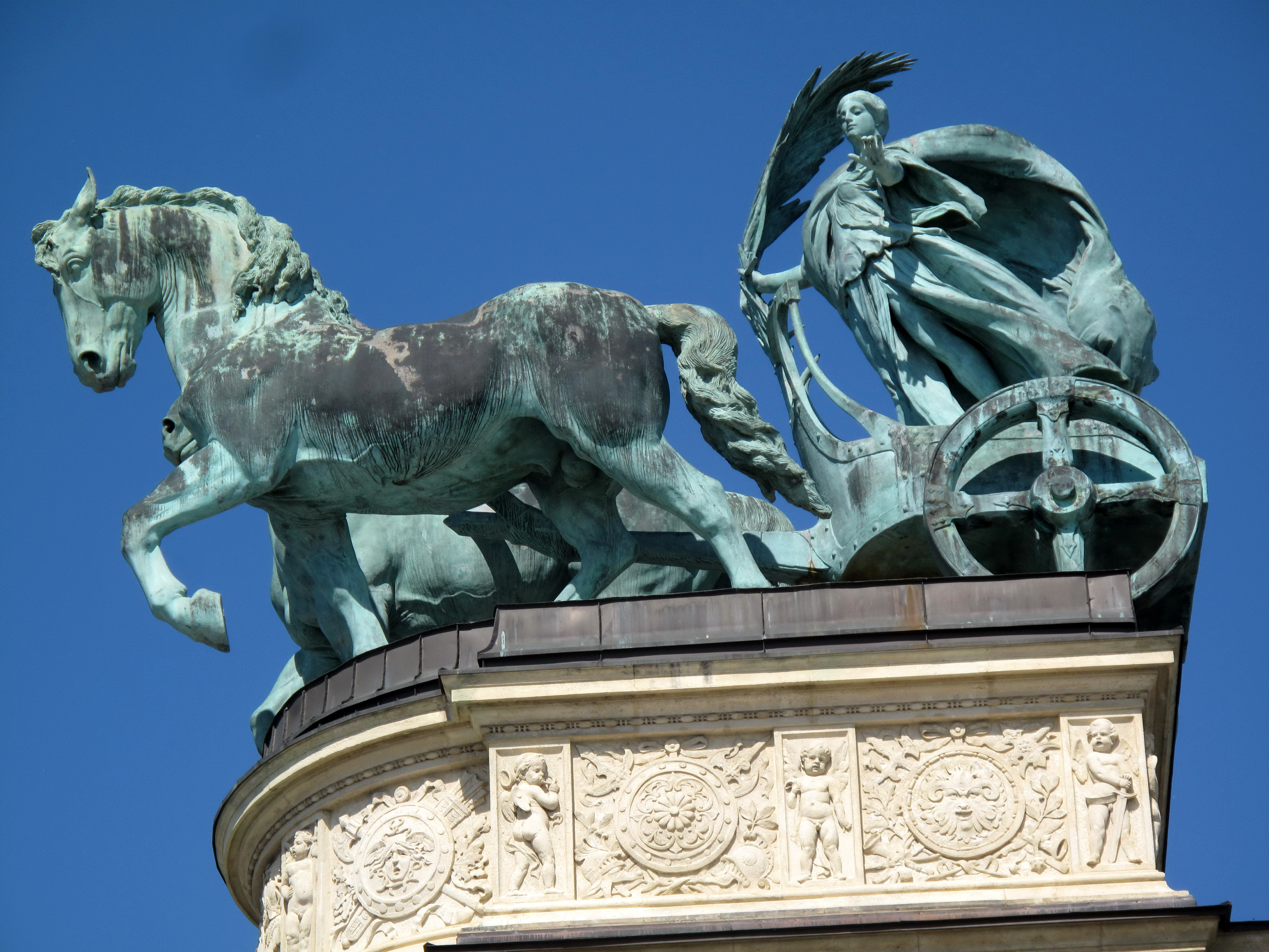 Náměstí Hrdinů, Budapešť